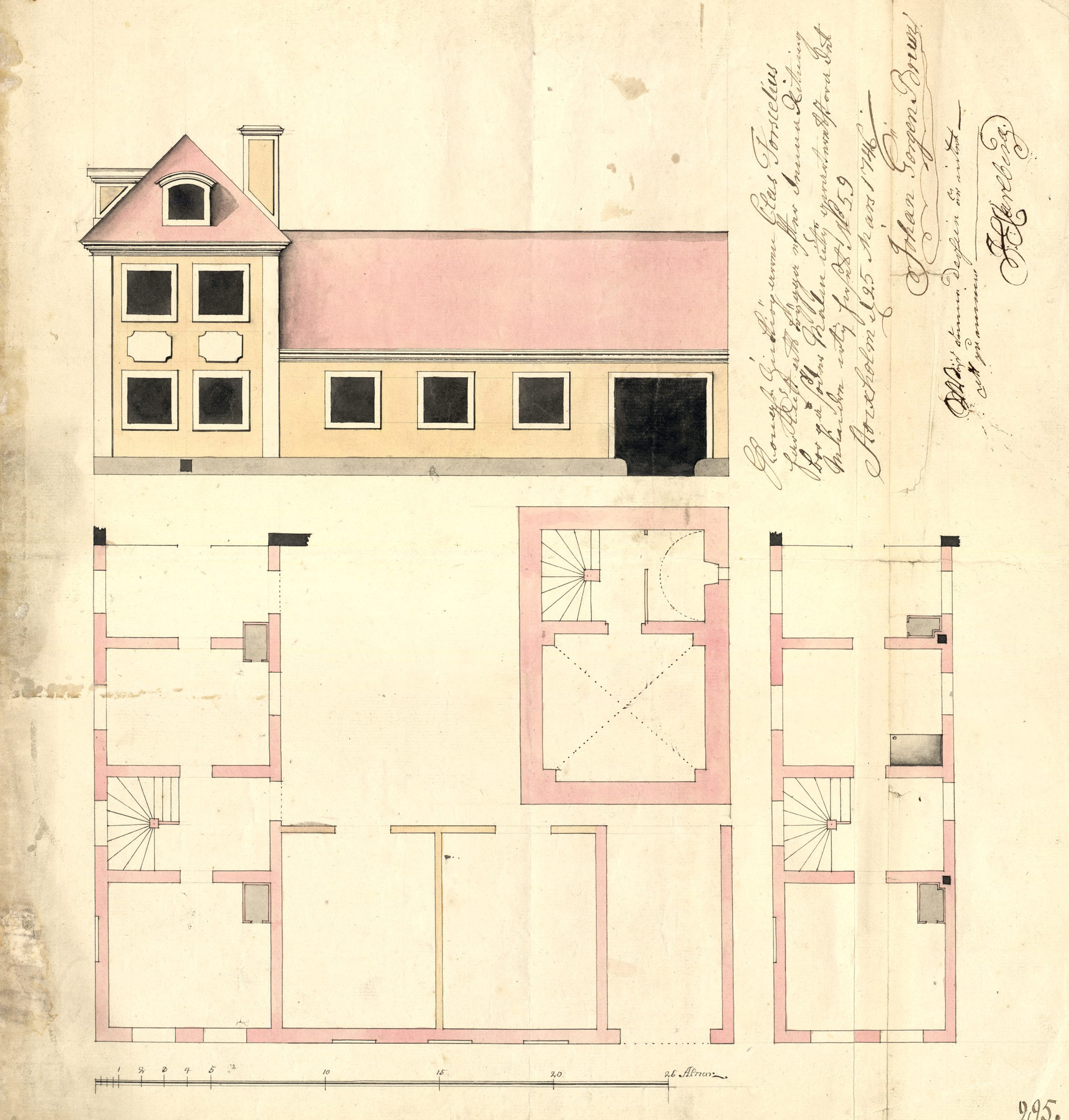 Ritning för stenhuset i fastigheten Sturen större 11